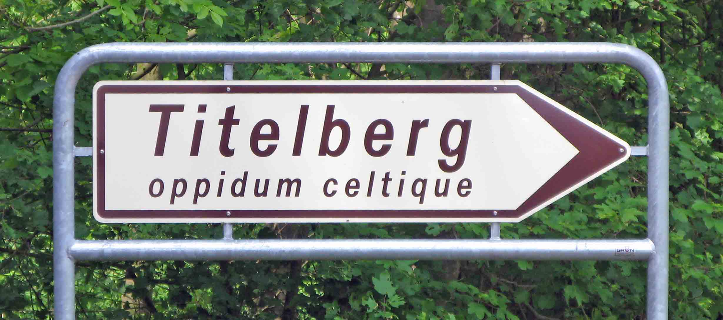 Tb.